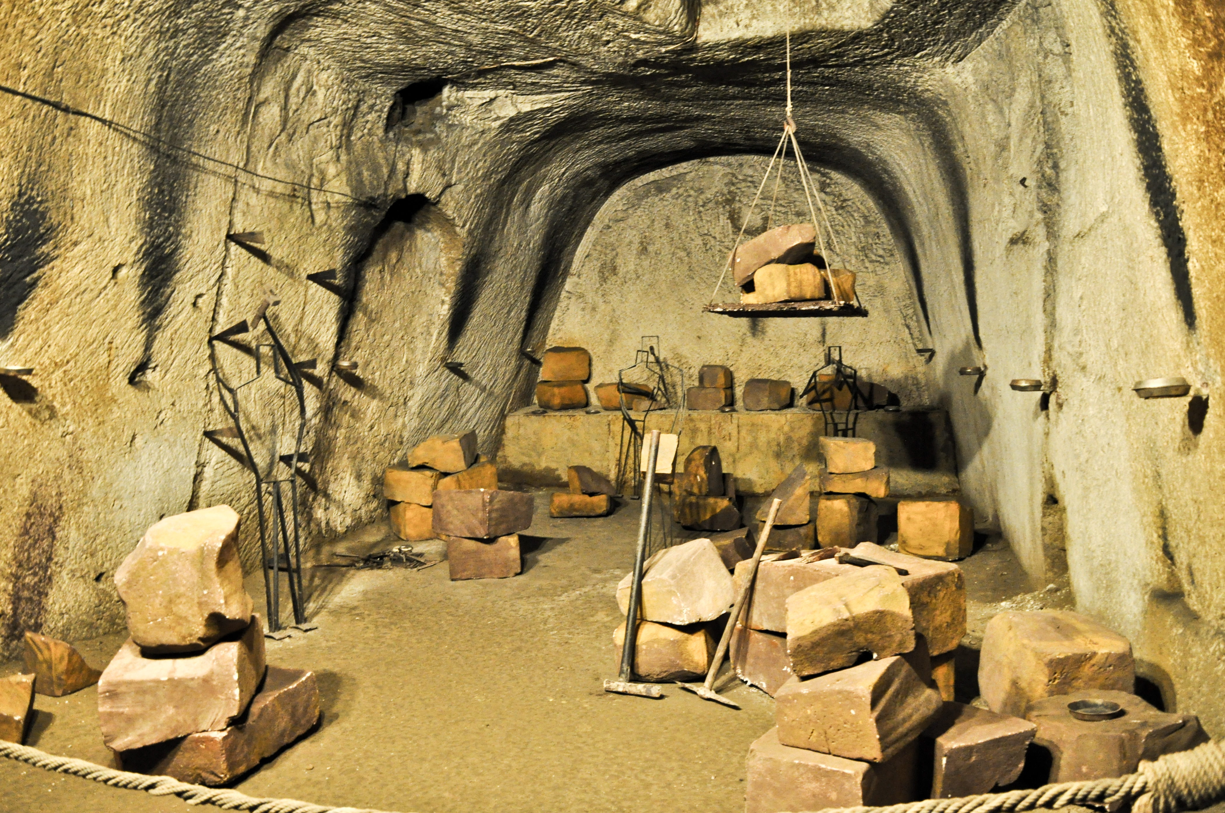 ...ed ecco la cava nella sua ricostruzione completa con tutti gli attrezzi utilizzati....